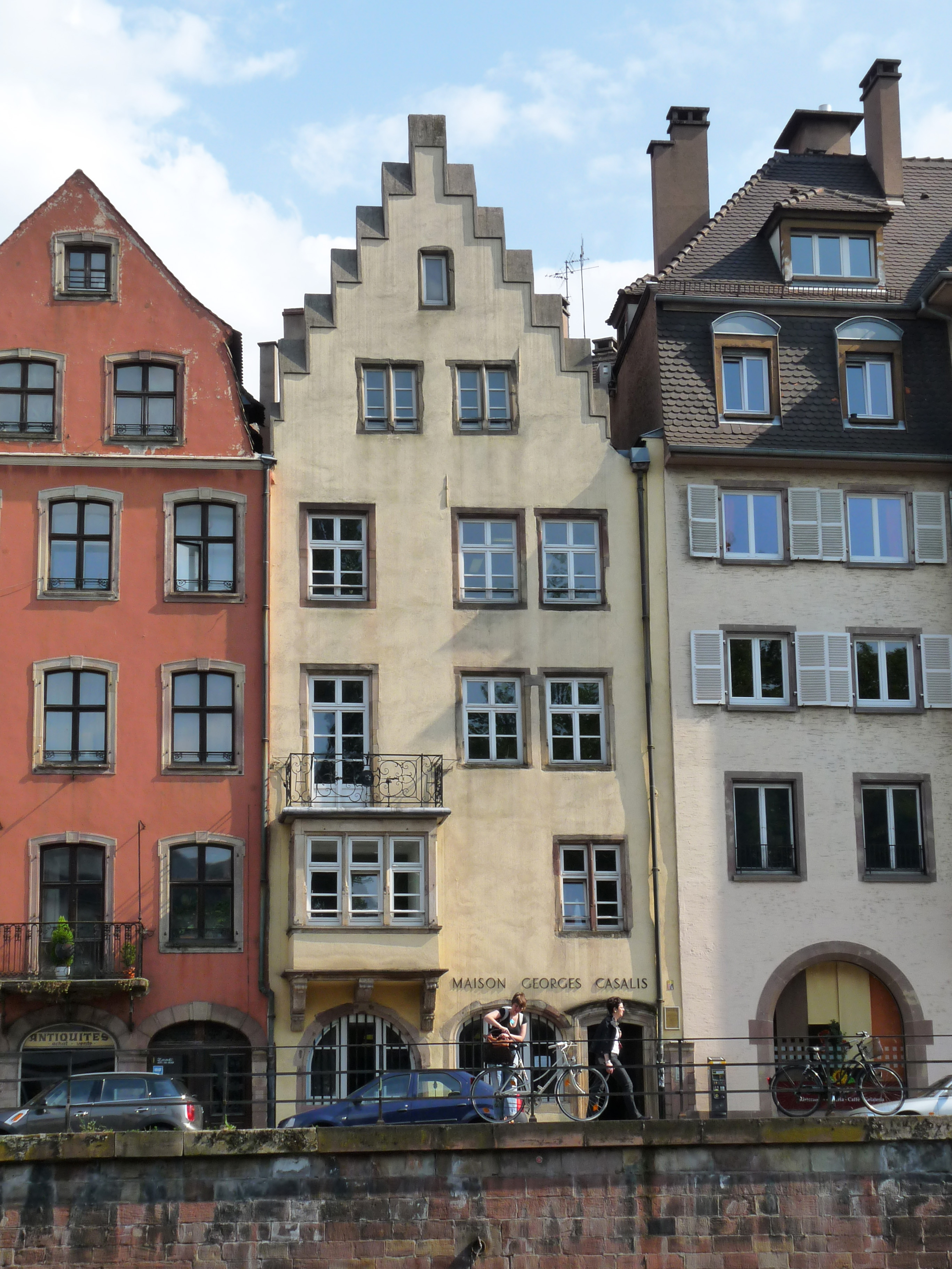 Strasbourg : Maison, 13 quai Saint-Nicolas. Construite en 1587, rénovée, inscrite aux Monuments historiques en 1929.